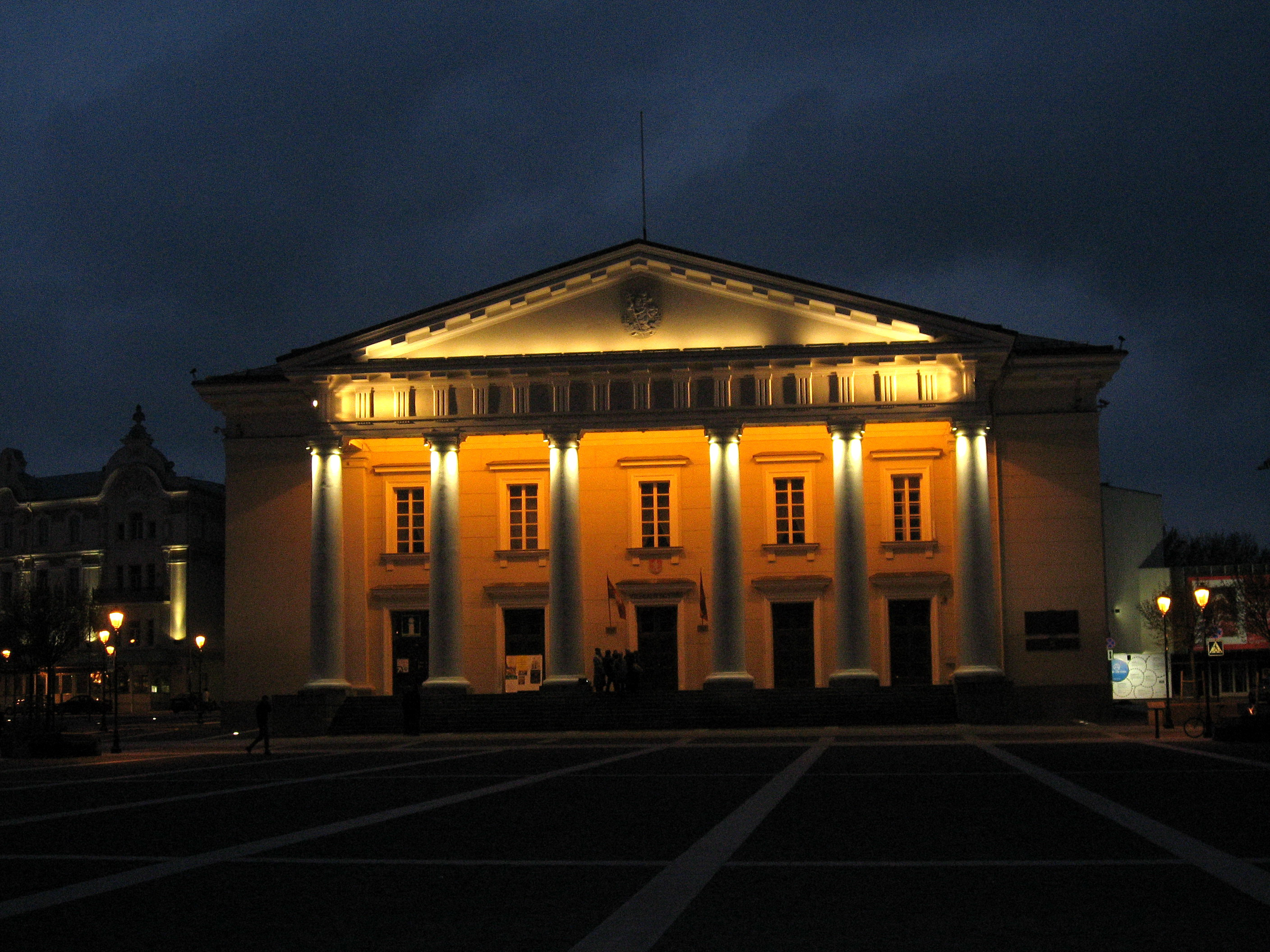 Vilnius, radnice